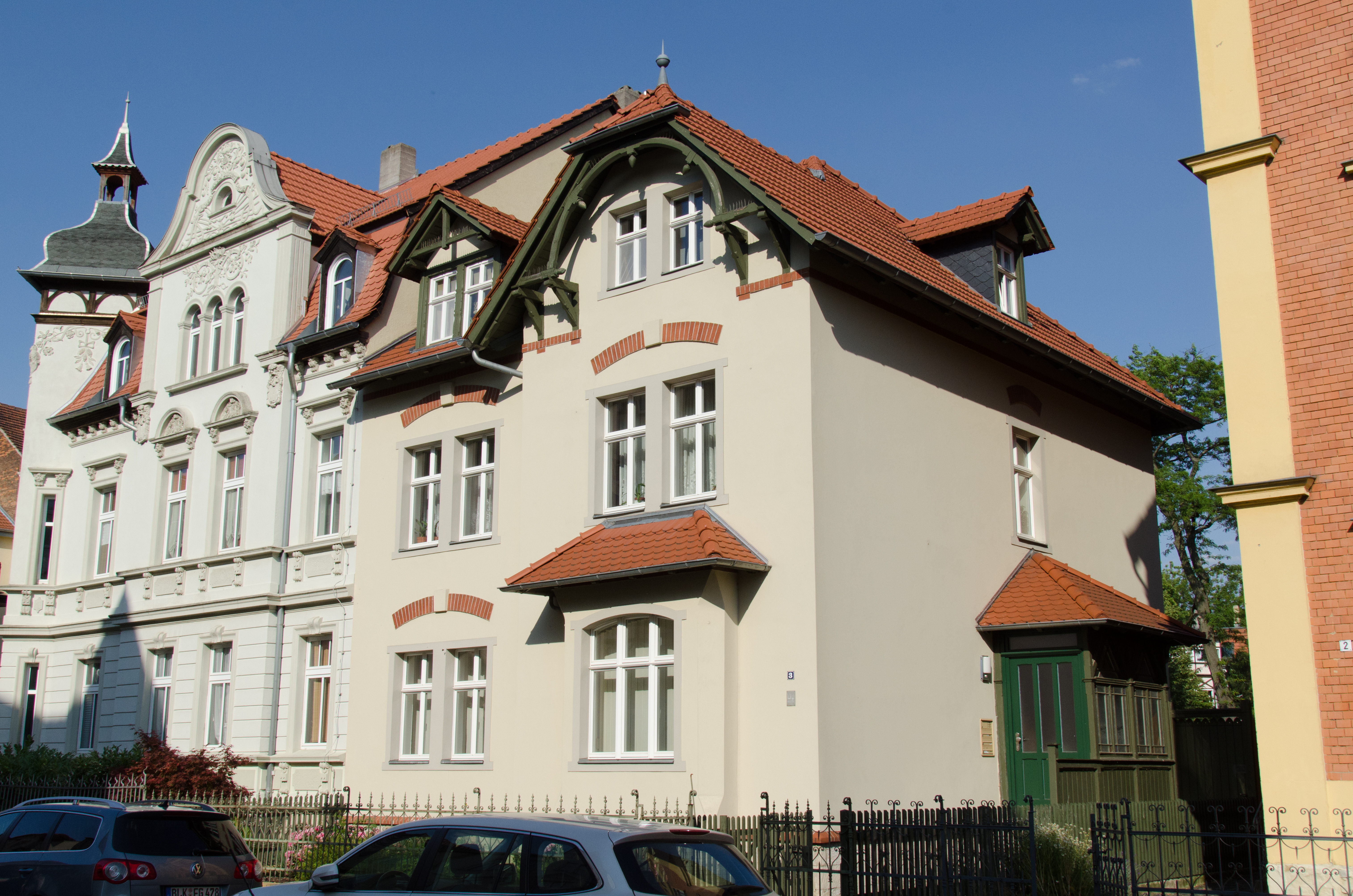 Naumburg, Wilhem